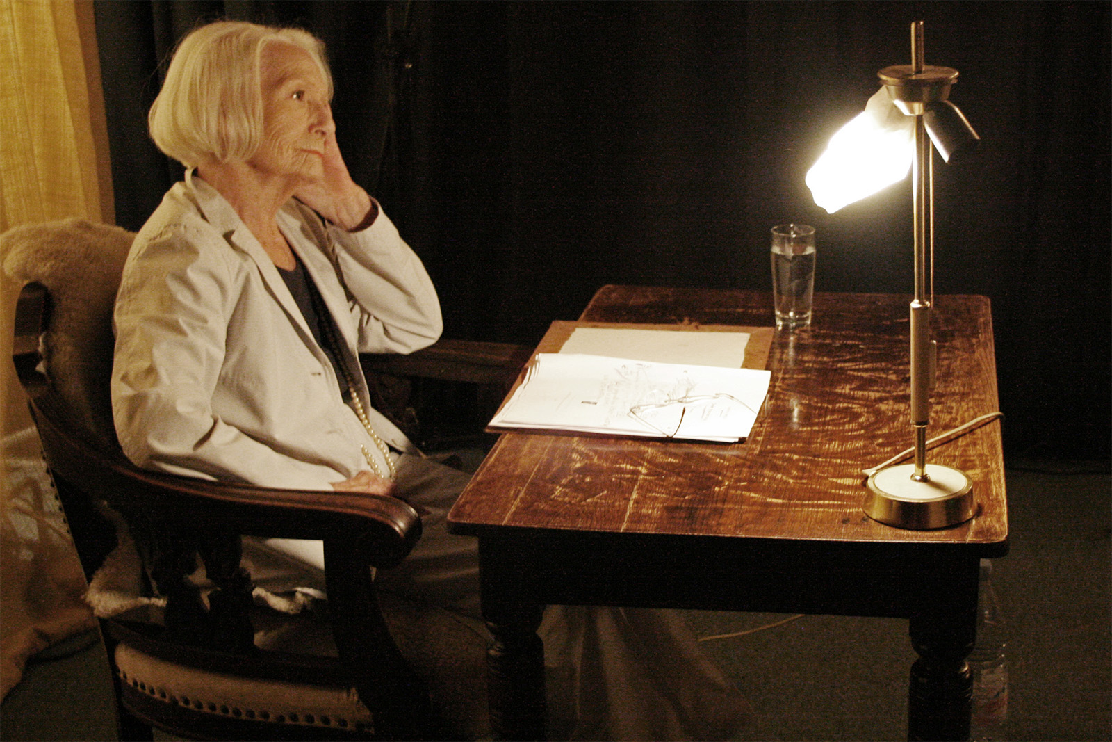 Inge Keller bei einer Lesung im Kino Tilsiter Lichtspiele in Berlin-Friedrichshain am 16.07.2009.